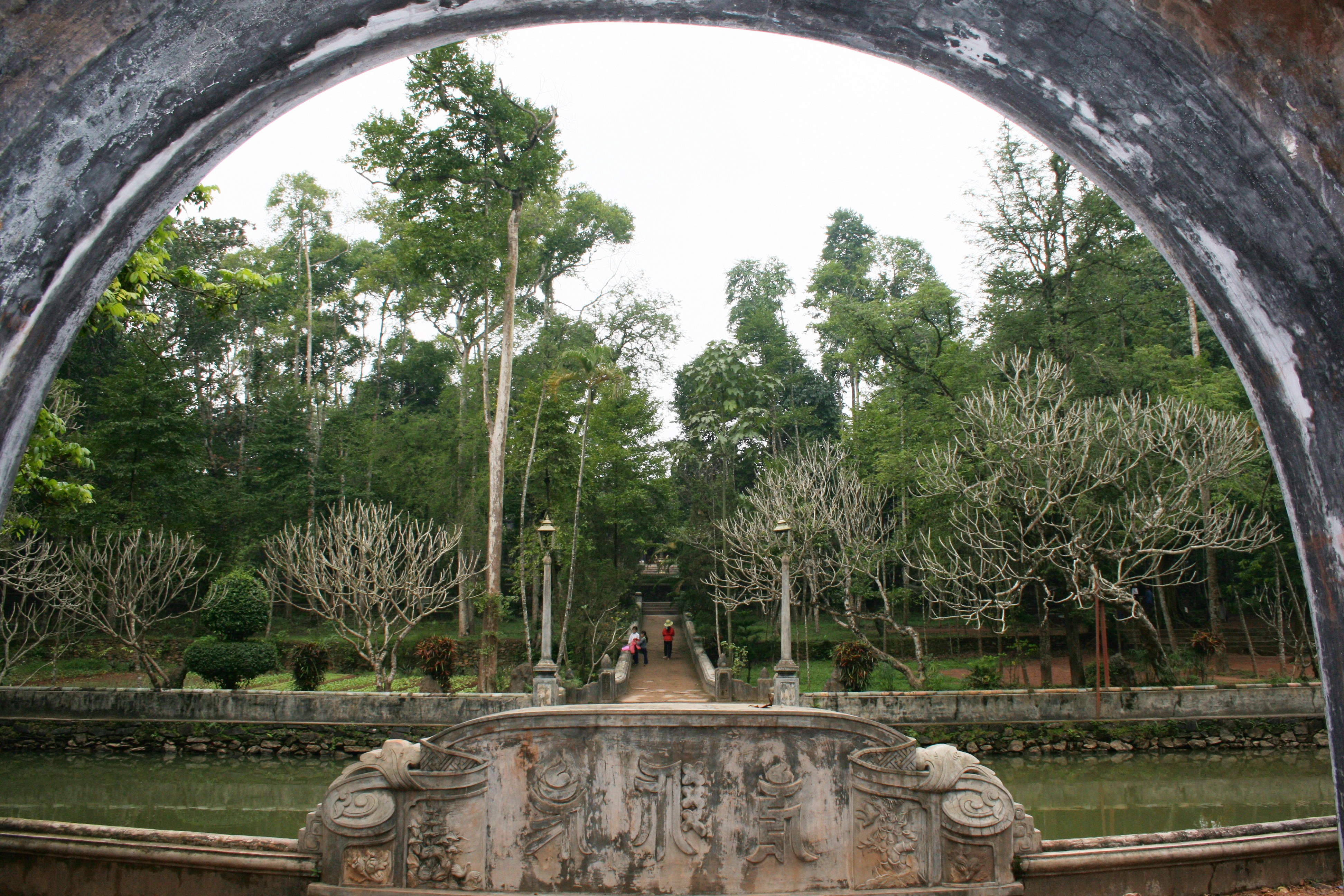 Tu Hieu Pagoda, Hue, Viet Nam